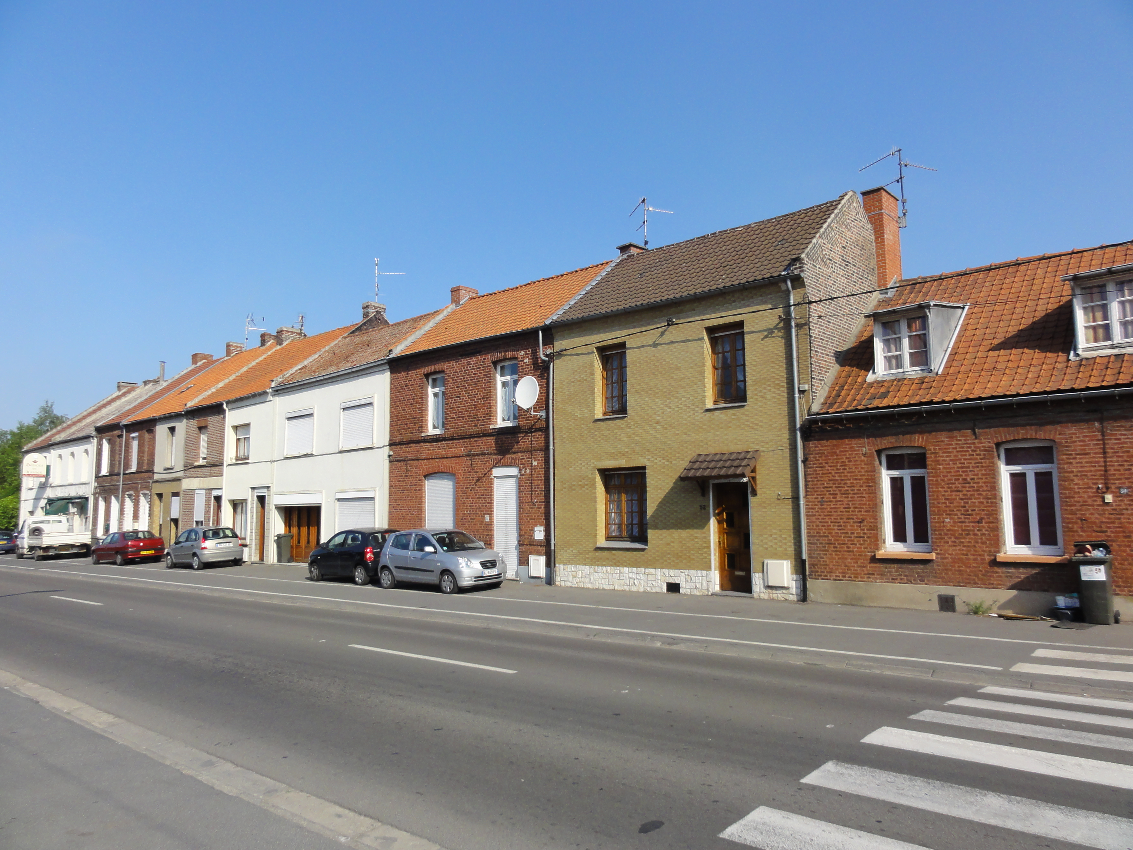 La Fosse Saint Hyacinthe de la Compagnie des mines d'Aniche était un charbonnage constitué d'un seul puits situé à Aniche, Nord, Nord-Pas-de-Calais, France.